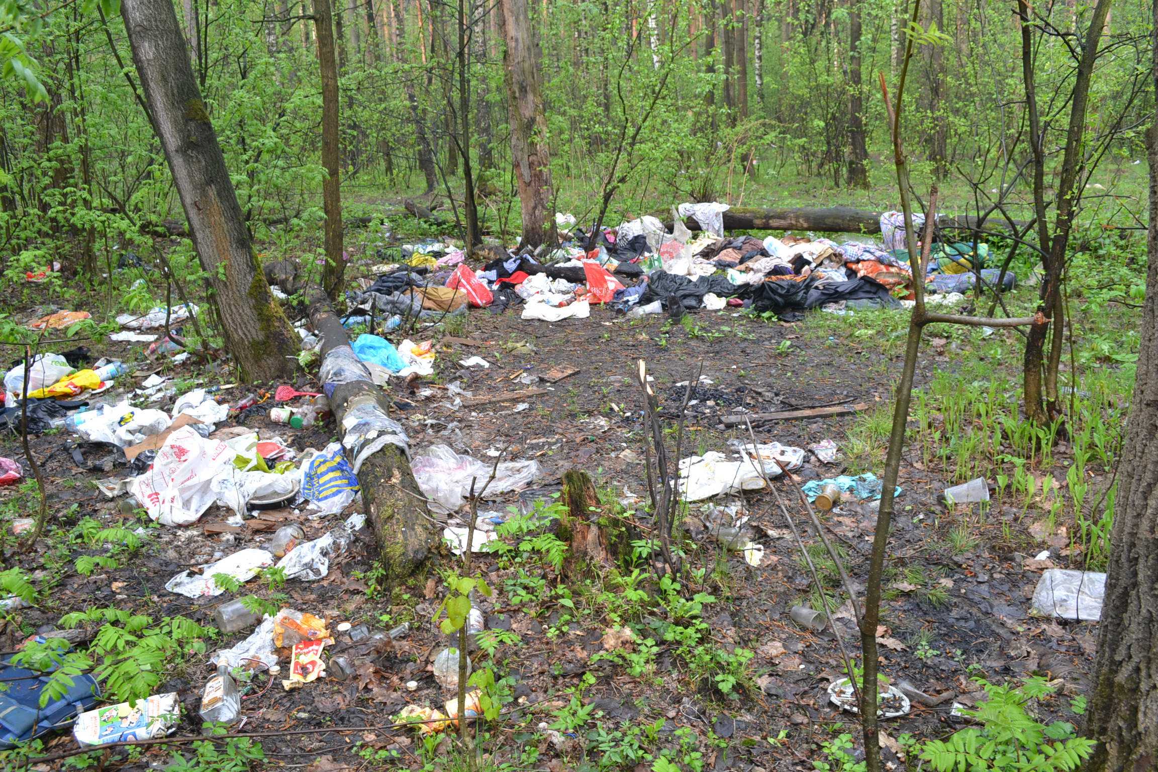 Мусор, оставленный после отдыха